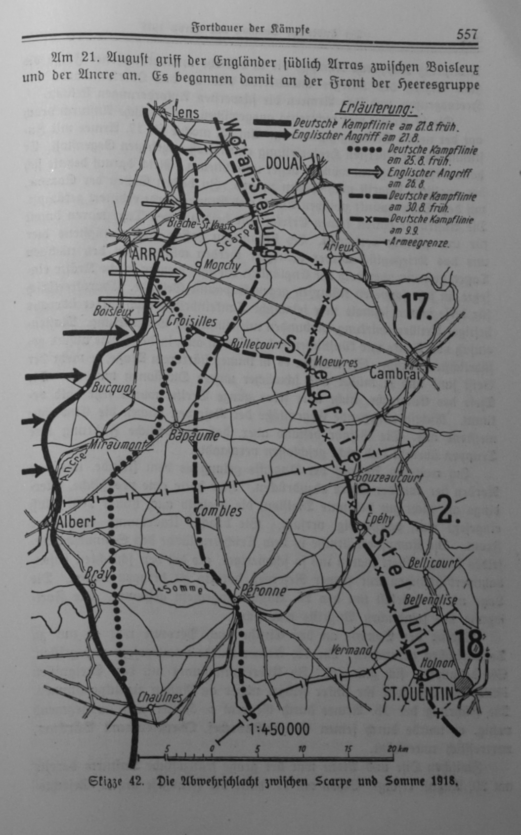 Foto "Meine Kriegserinnerungen" 1914 - 1918